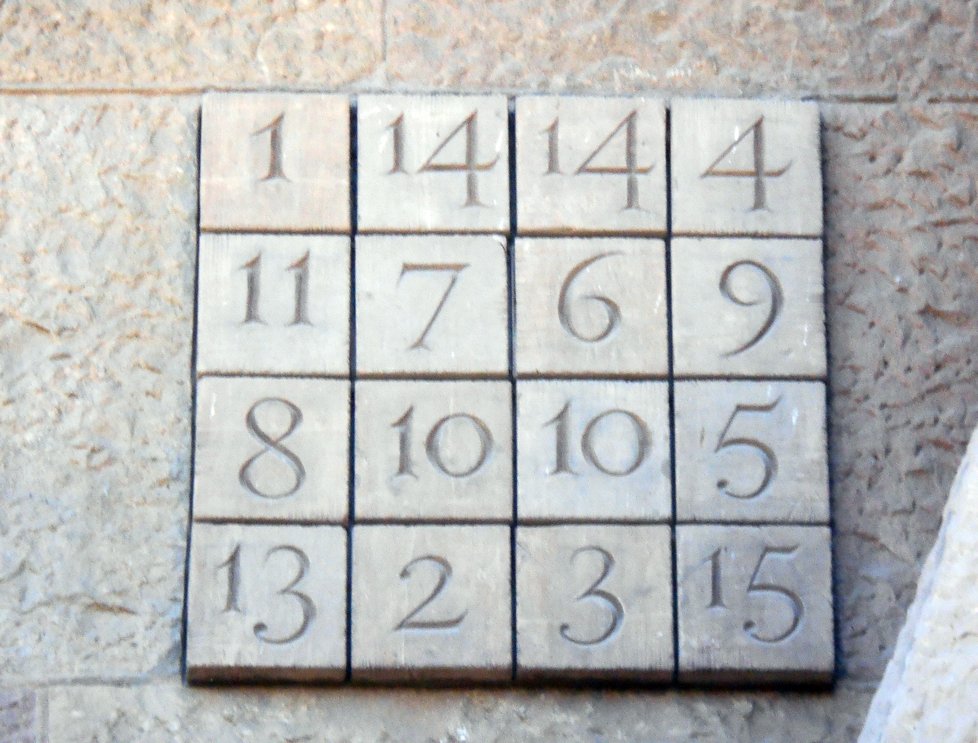 Cuadrado mágico.